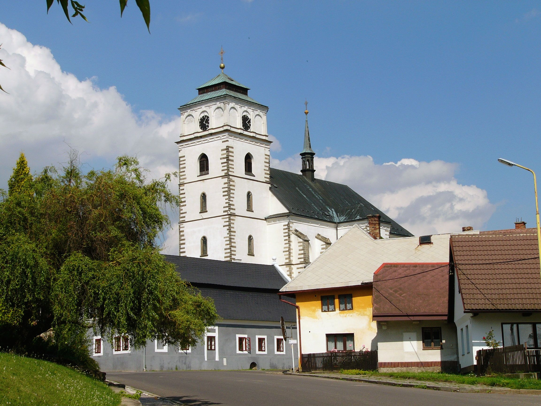 Kostel sv. Maří Magdaleny od jihozápadu